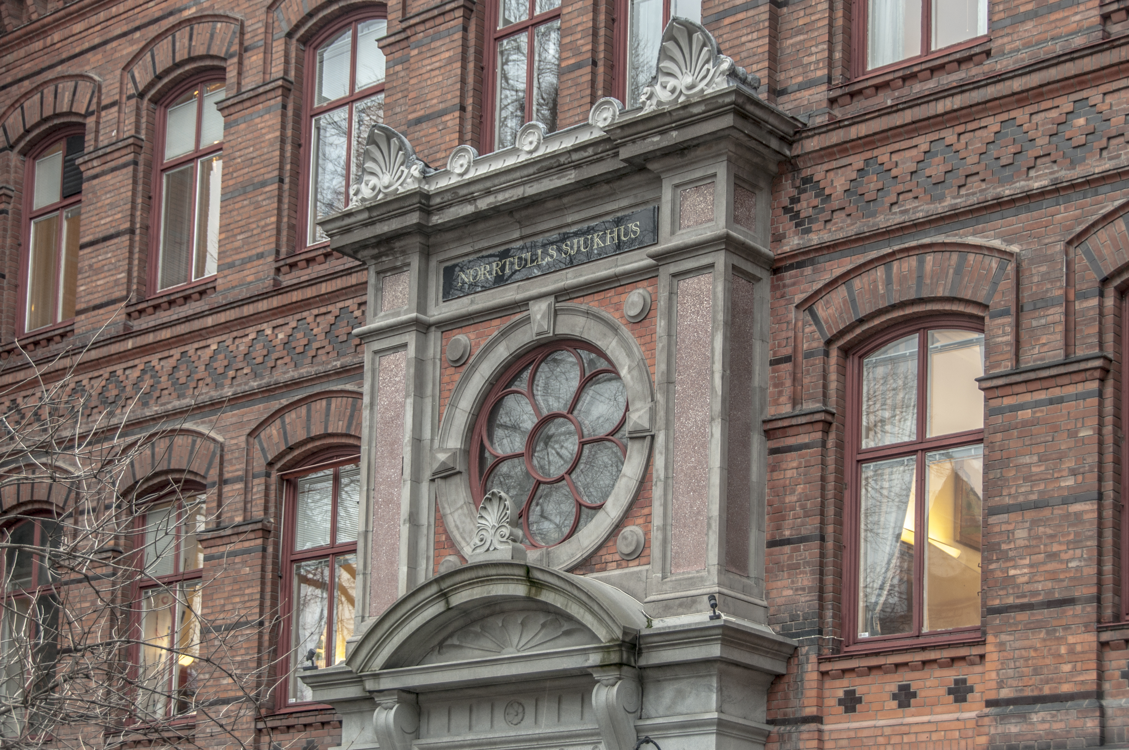 Norrtulls sjukhus, Nybyggnadsår 1880 - 1885 som Allmänna Barnhuset. Arktitekt: Frans Gustaf Abraham Dahl Byggmästare:Andreas Gustaf Sällström